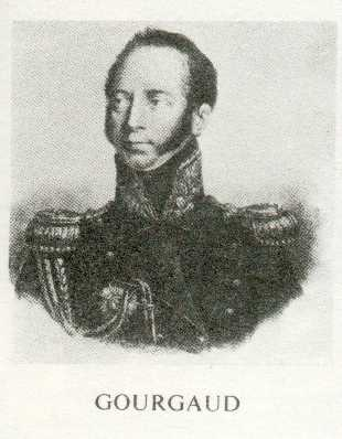 Général_gourgaud